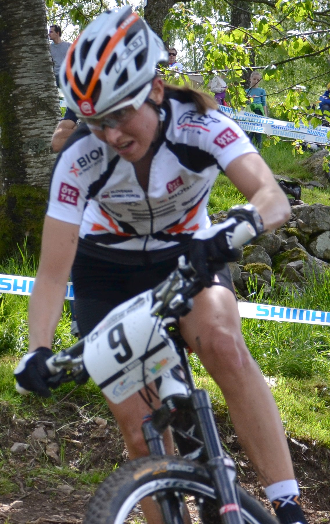 Blaza Klemencic lors de la 4e manche de la coupe du monde de VTT 2012 à La Bresse (FRA).